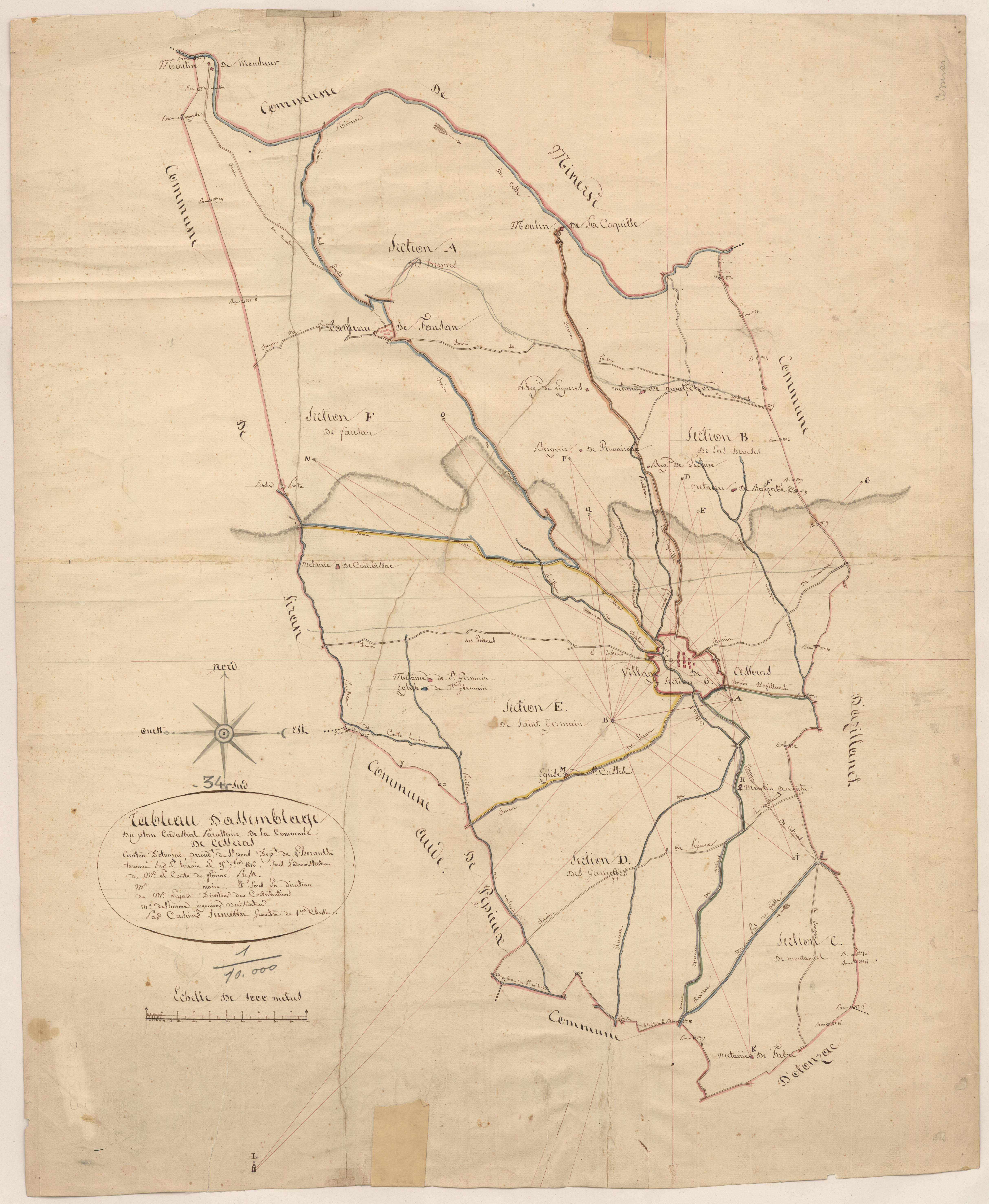 Cesseras. - Cadastre napoléonien : tableau d'assemblage